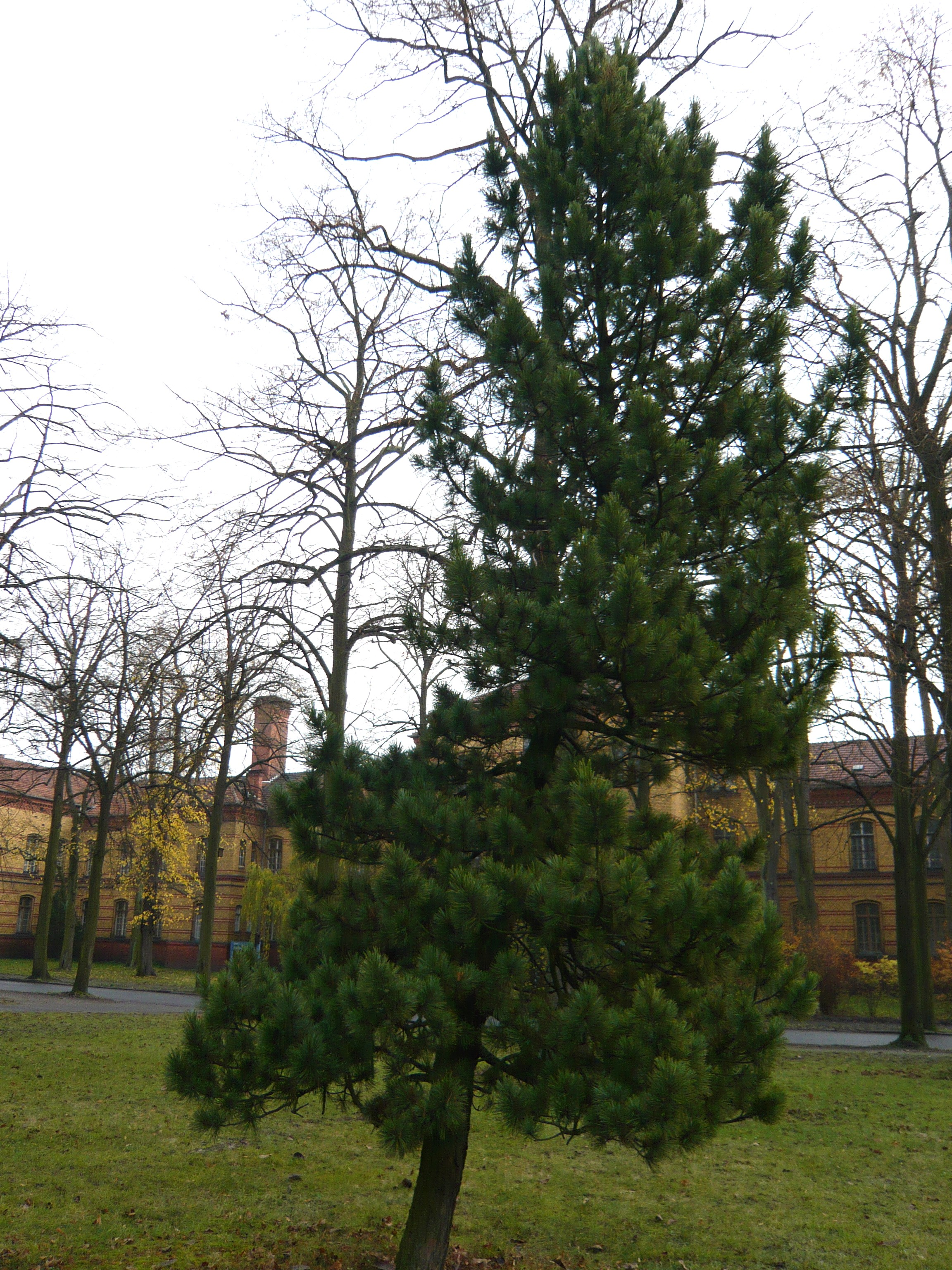 Wilhelm-Griesinger-Krankenhaus, Beispiel für einen gekennzeichneten Baum auf dem Gelände